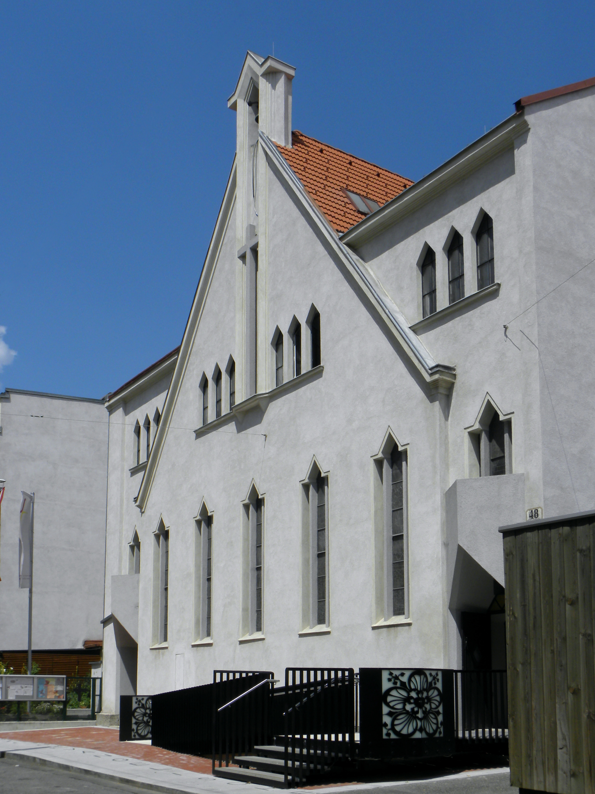 Evang. Pfarrkirche A.B., Kreuzkirche